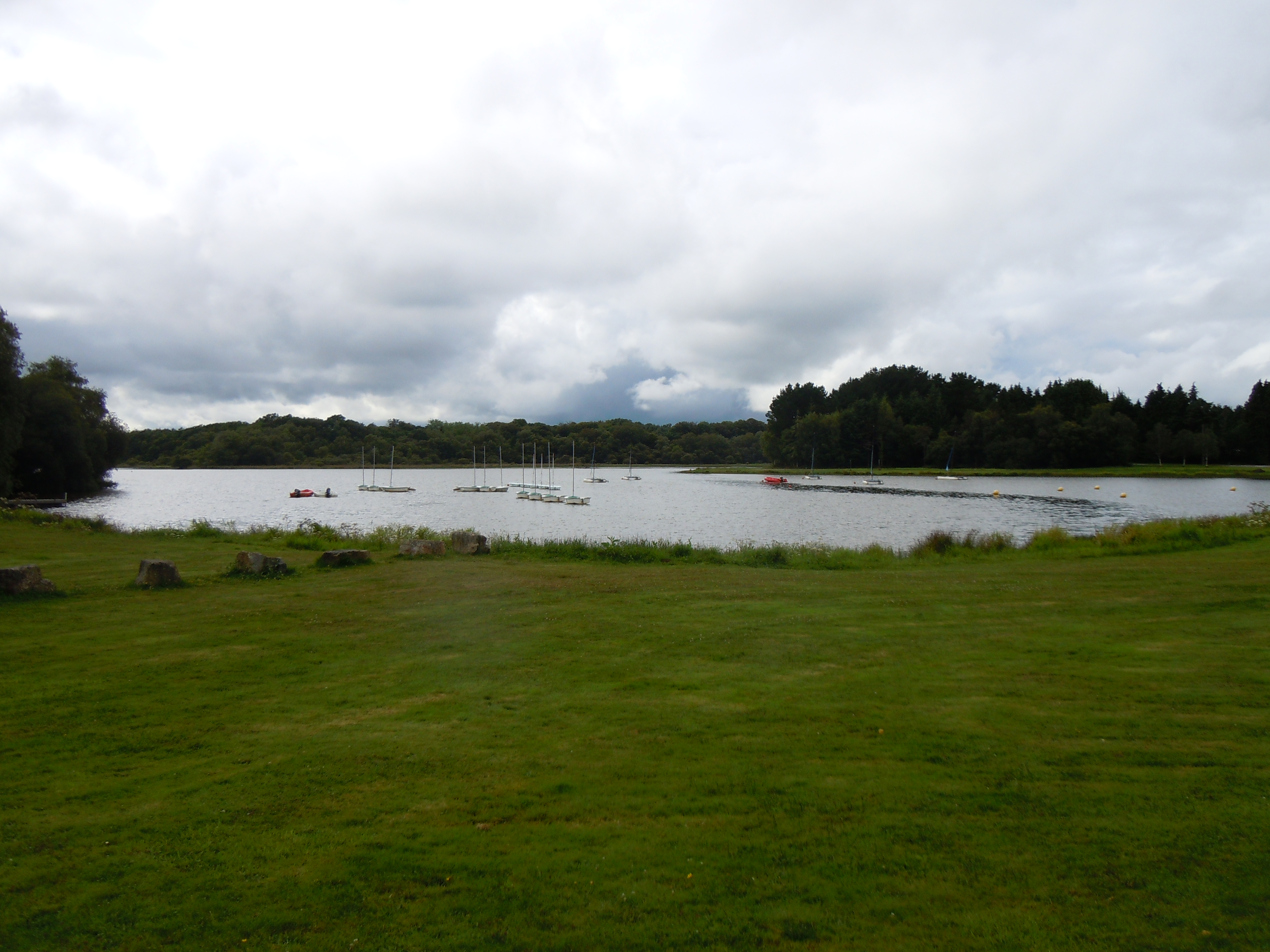 étang du bel air aménagé en base de loisir, commune de Priziac, département du Morbihan, France